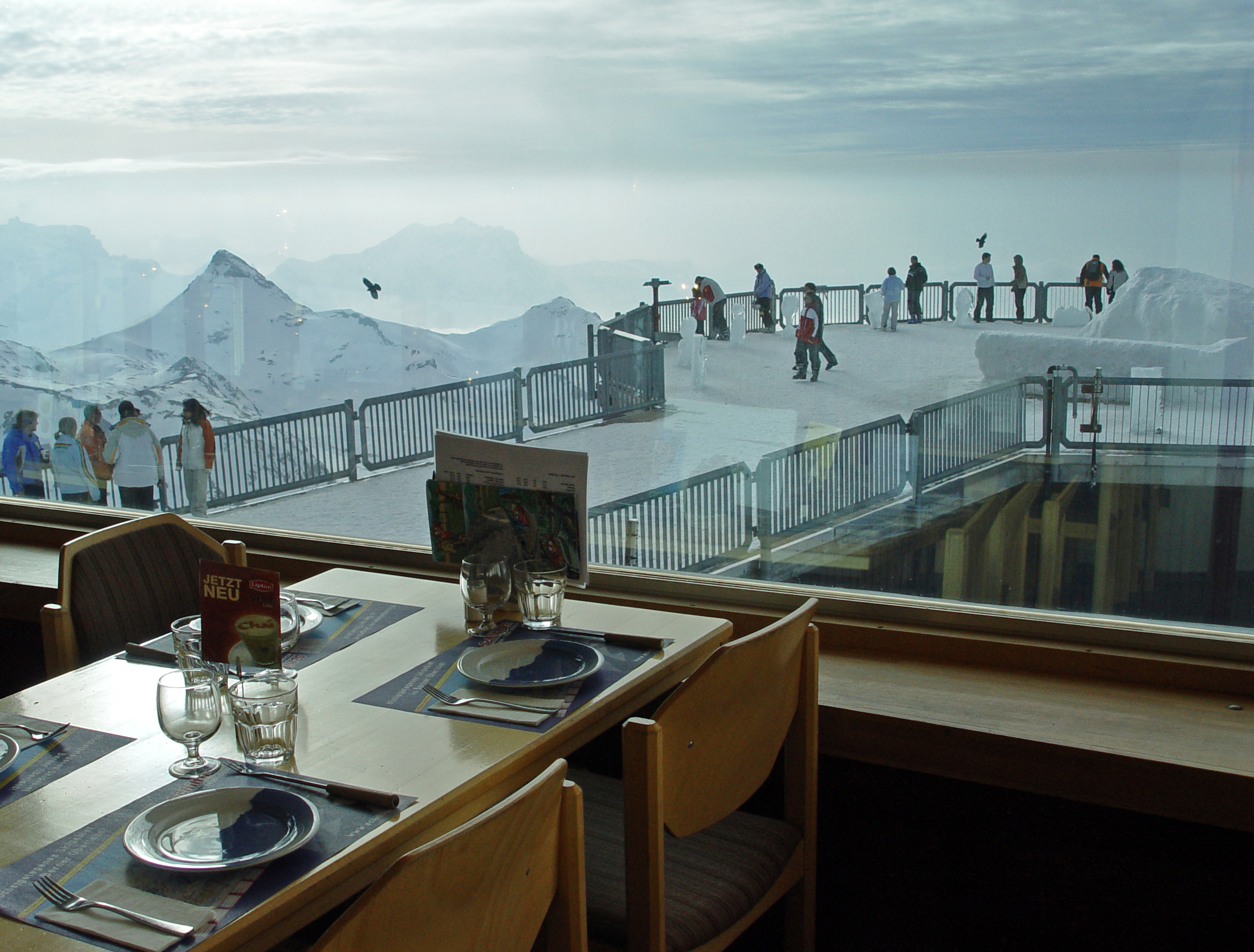 Blick vom Restaurant "Piz Gloria" auf die Schilthorn-Terrasse